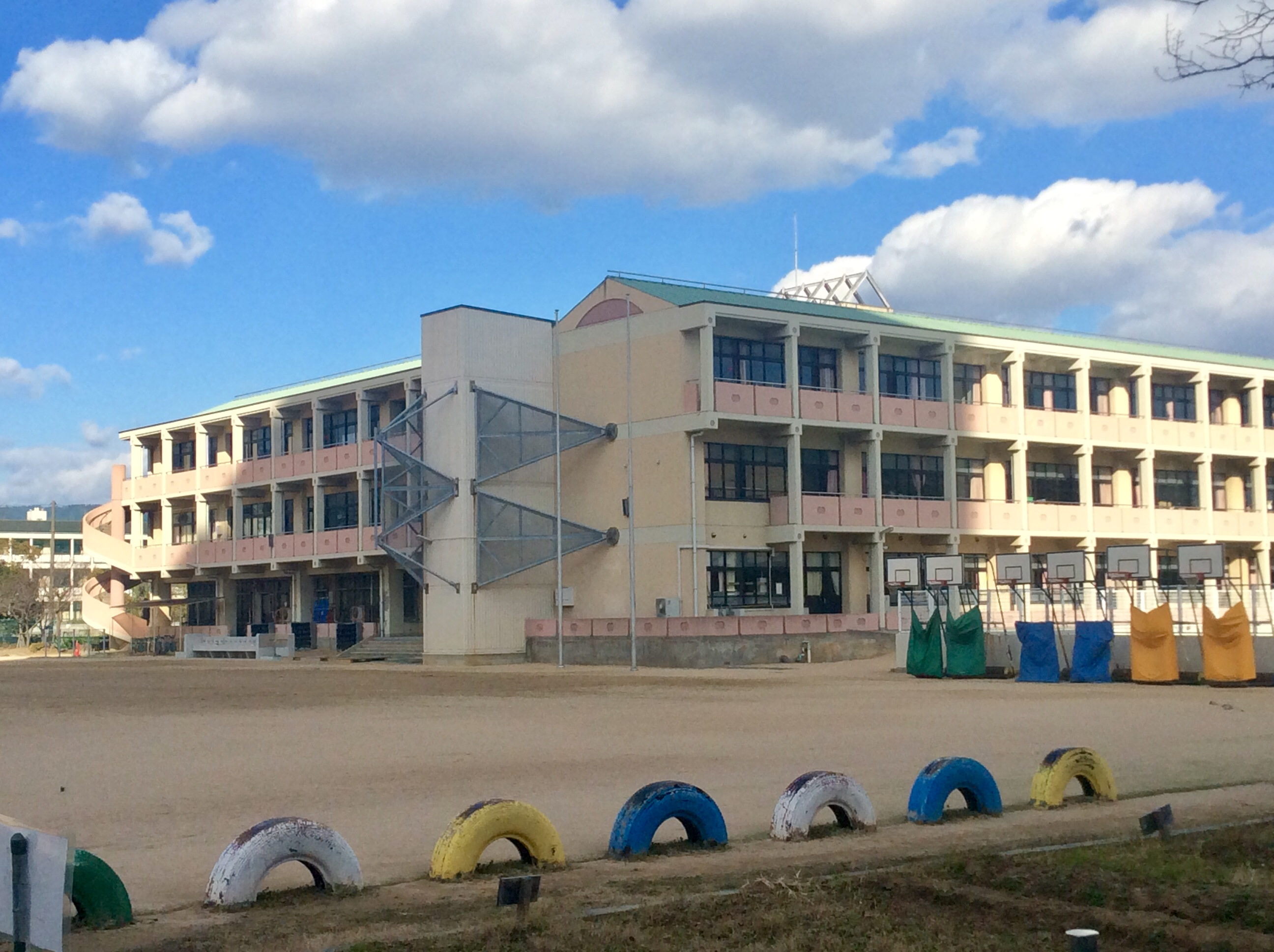 神戸市立六甲アイランド小学校